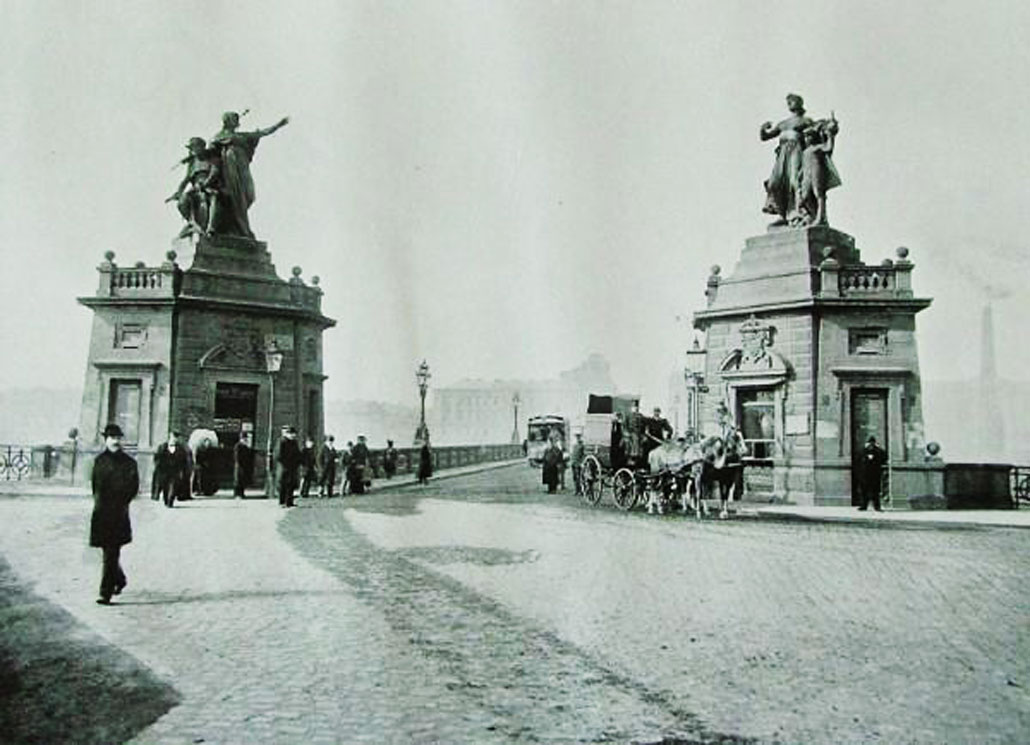 Мост Палацкого в XIX веке